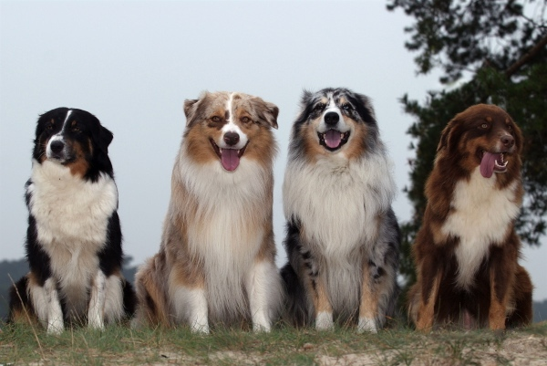 Australische herder in verschilldende kleurslagen. Categorie:Afbeelding hond